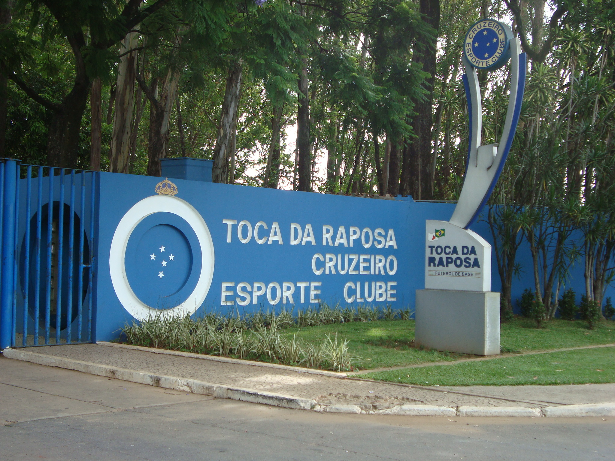 Toca da Raposa, Belo Horizonte/MG